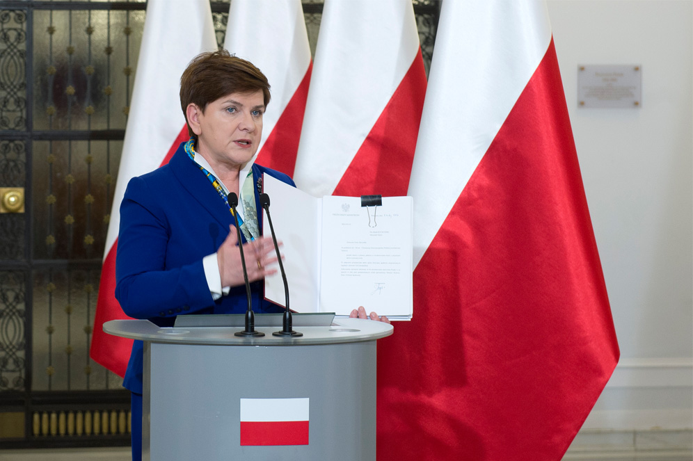 Prawo i Sprawiedliwość Beata Szydło składa projekt 500 plus do Sejmu. 2016.02.01 Warszawa, Sejm. Rząd skierował dziś projekt Rodzina 500plus do Sejmu – poinformowała na konferencji prasowej premier Beata Szydło.